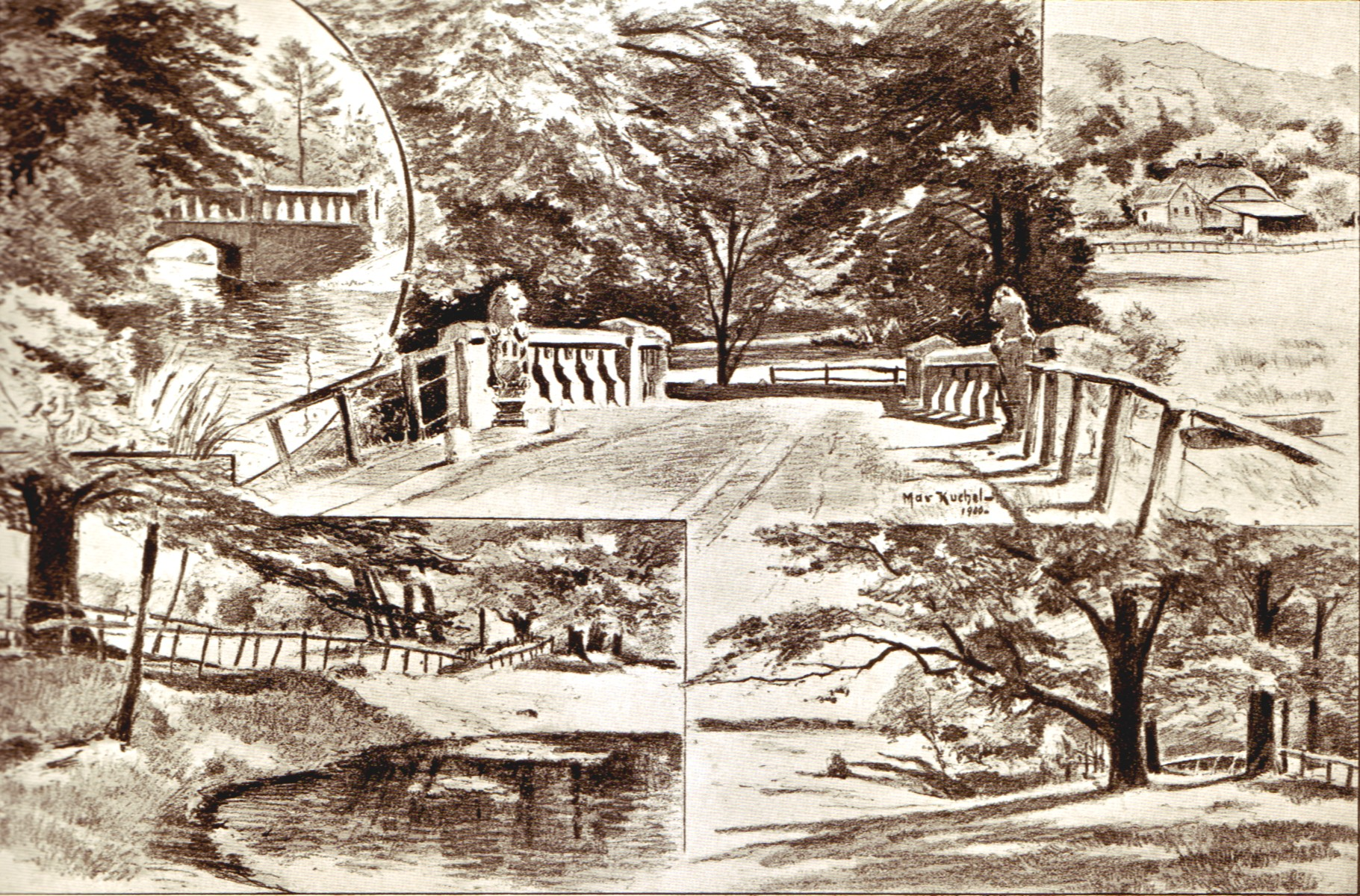 Landsitz "Hammerhof" in Hamburg-Hamm, damals im Besitz der Familie Sieveking, Zeichnung (Kohle/Bleistift?) von Max Kuchel (1859–1933). Die im oberen Bild zu sehenden Löwenfiguren befinden sich heute im Museum für Hamburgische Geschichte.